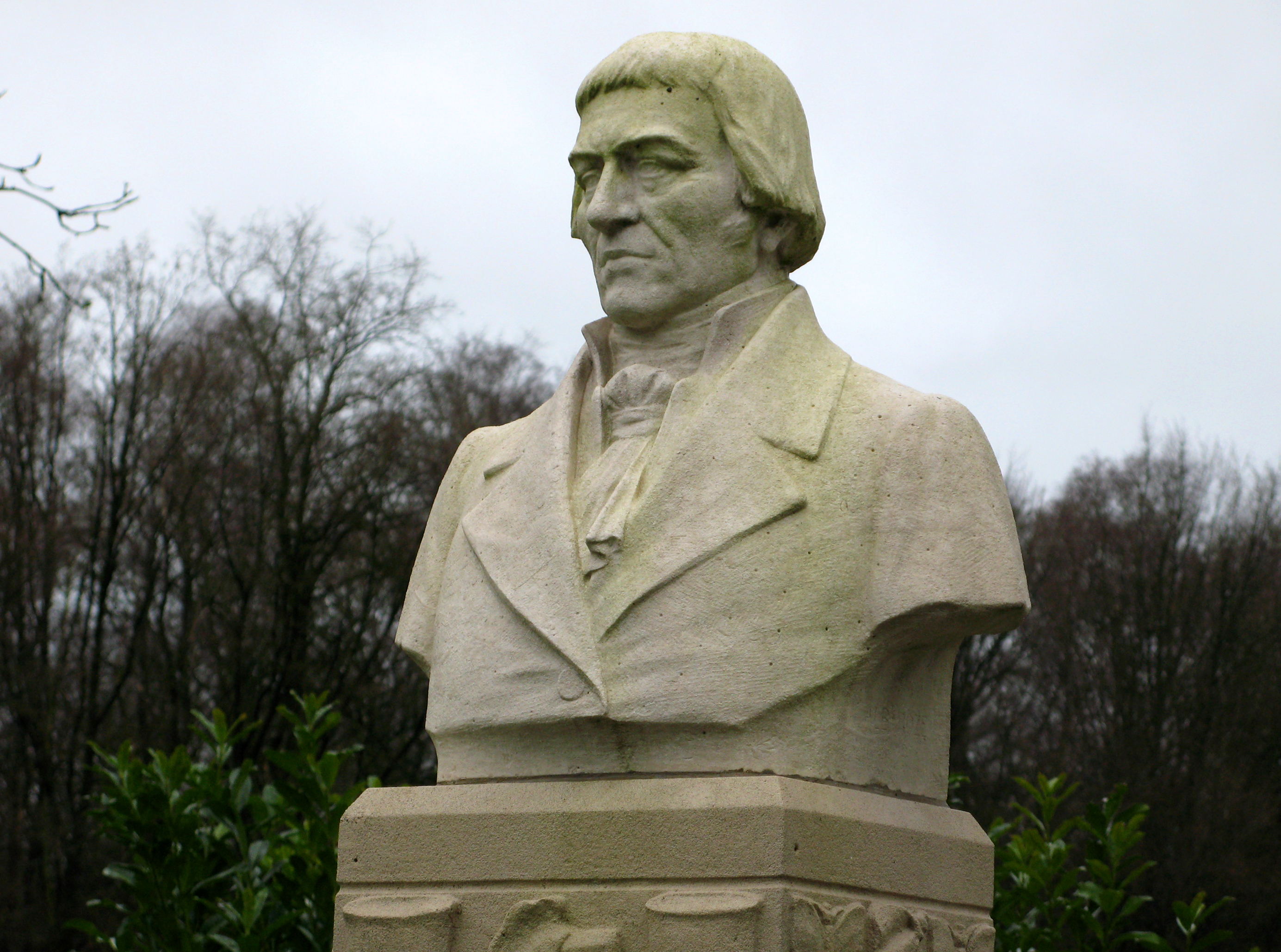 Bazentin (Somme, France) - Le buste de Lamarck, surmontant le monument érigé à sa mémoire, à proximité (en arrière) de l'église. . .